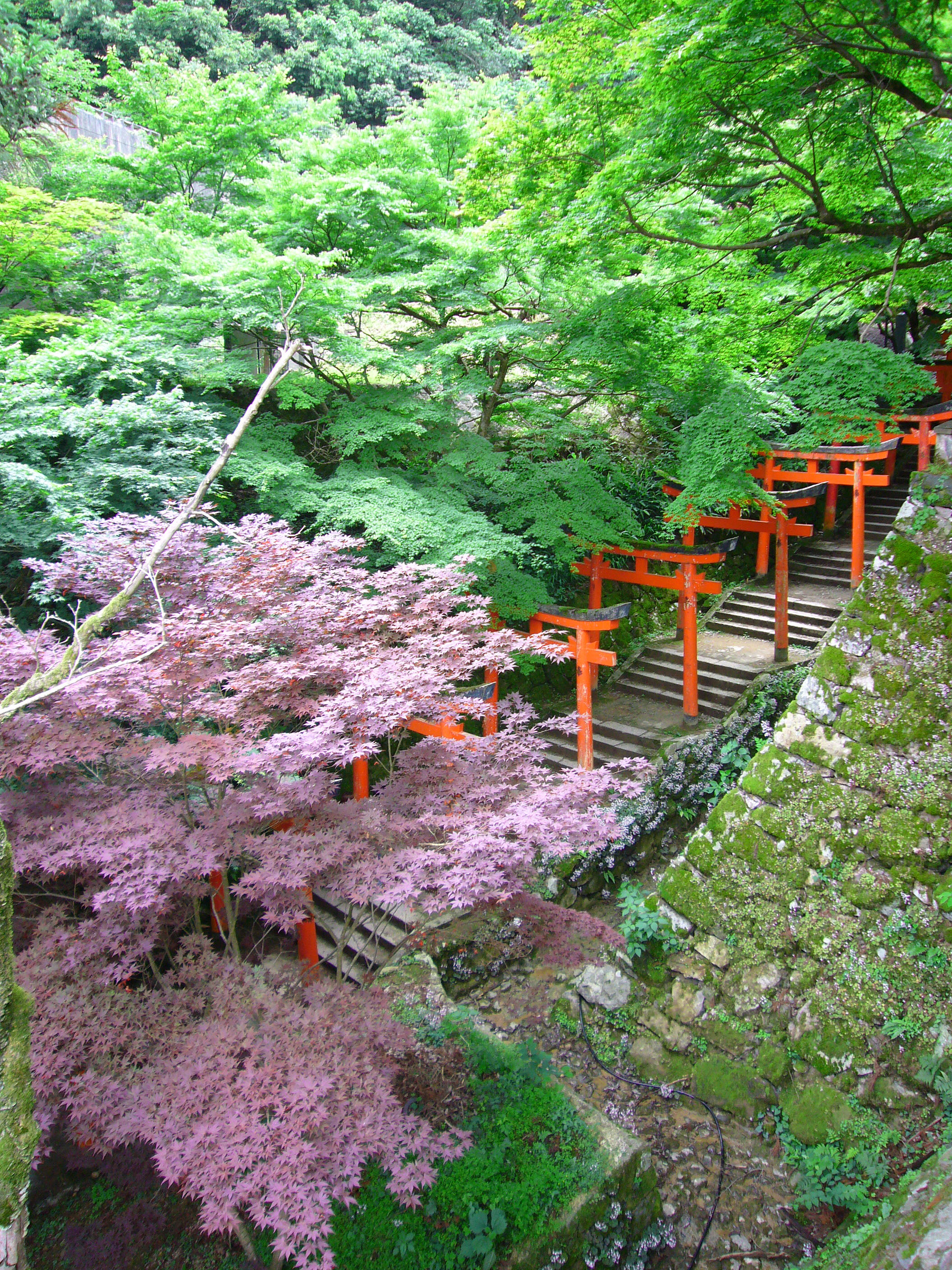 Izushi Castle in Toyooka, Hyogo, Japan